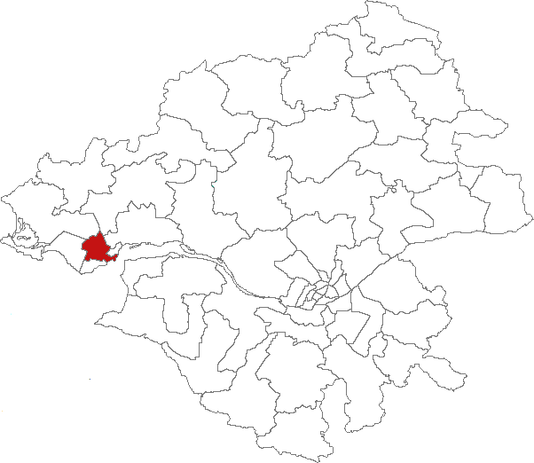 Carte de localisation du canton de Saint-Nazaire-centre (France, Loire-Atlantique)